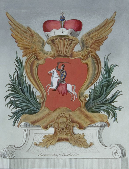 Беларуская (тарашкевіца): Копія картуша з гербам Вялікага Княства Літоўскага — Пагоняй (Pahonia) — з Пасольскай ізбы ў Каралеўскім замку